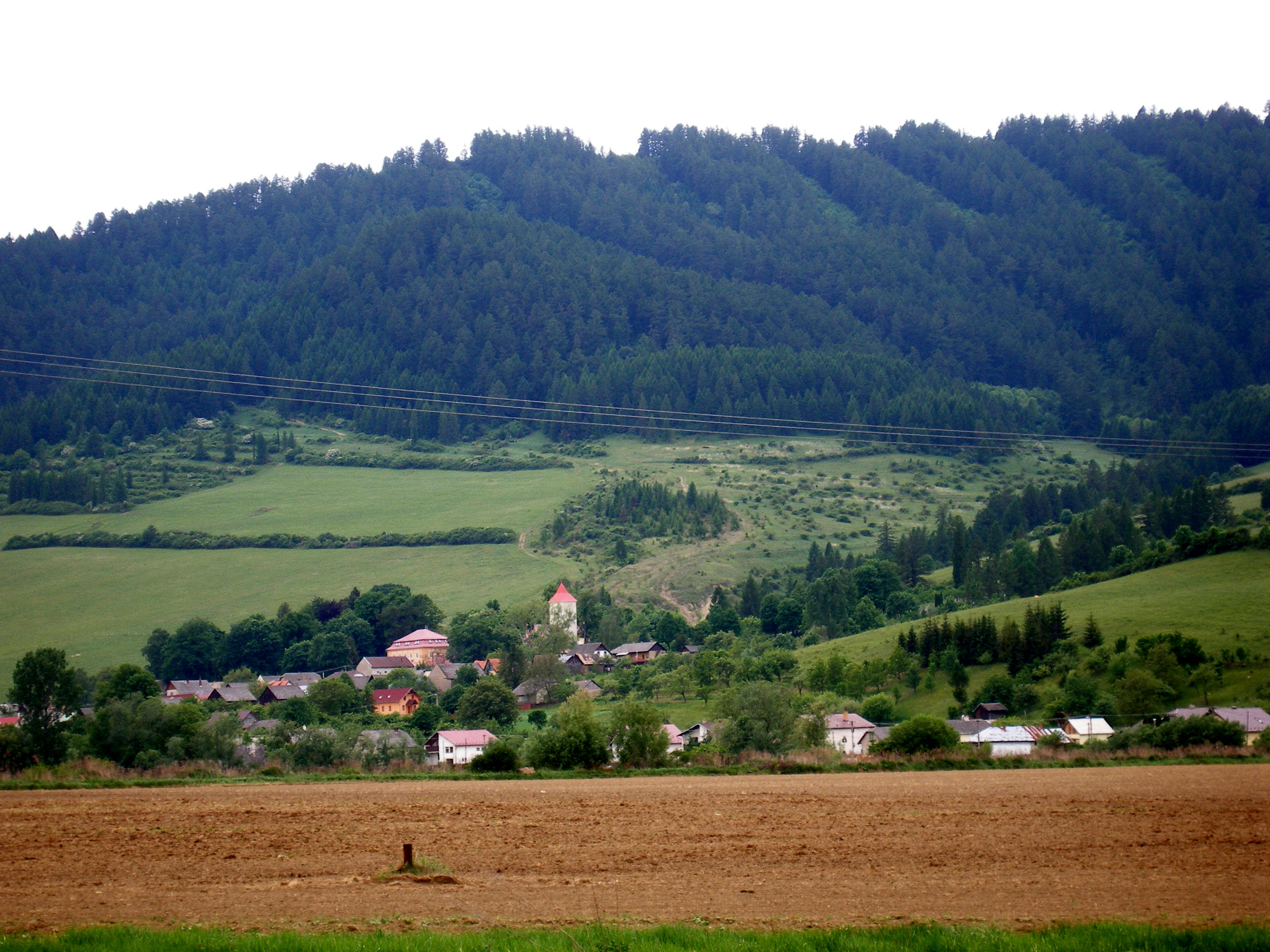 Obec Brezovička okres Sabinov